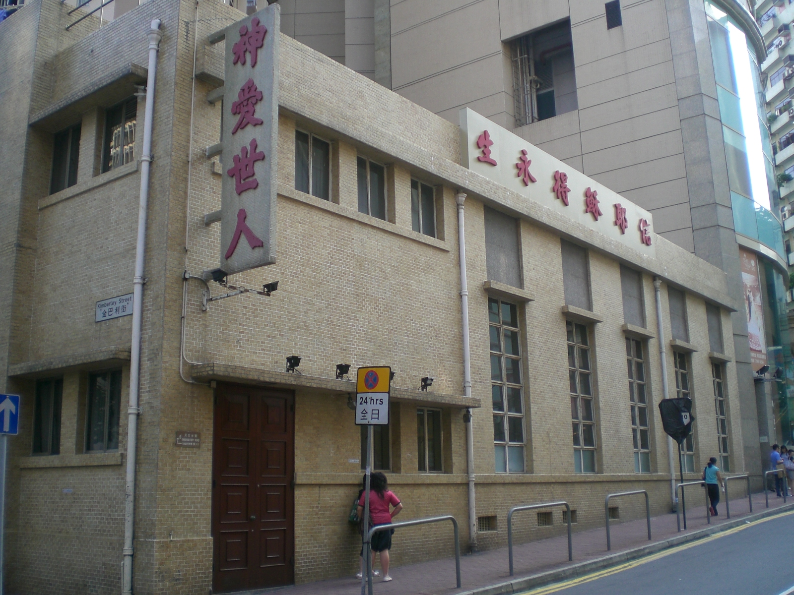 Church, 尖沙咀, 金巴利街, 天文臺道交界. 教會聚會所（基督徒管家）